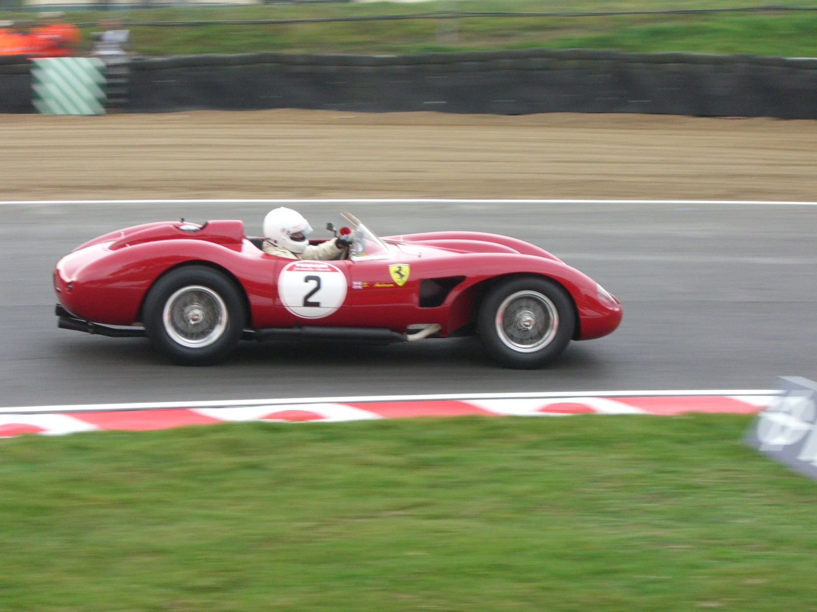 Stuart Anderson in a Ferrari 250 GTE/TRC